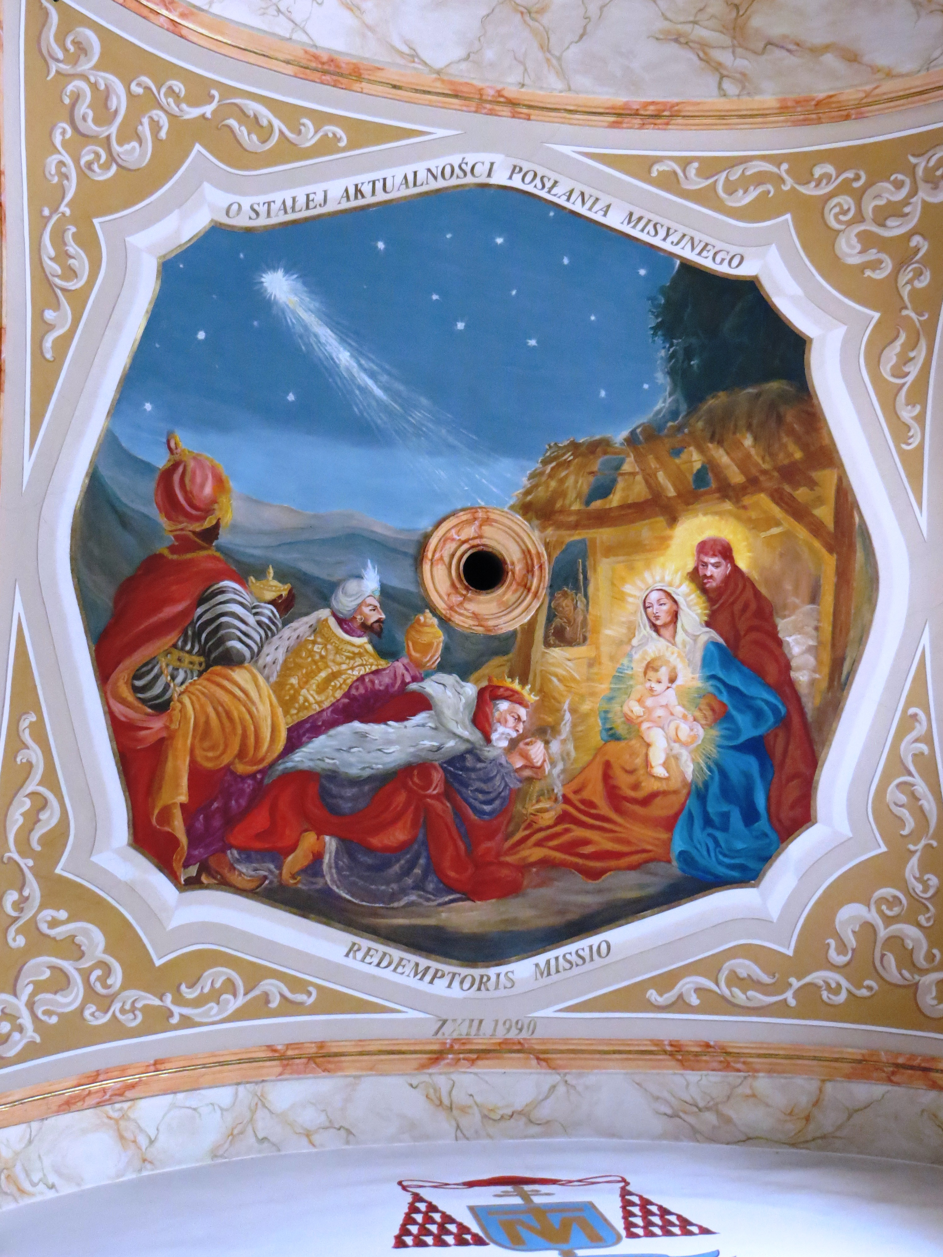 Malowidła na suficie w bazylice ONMP w Wadowicach.